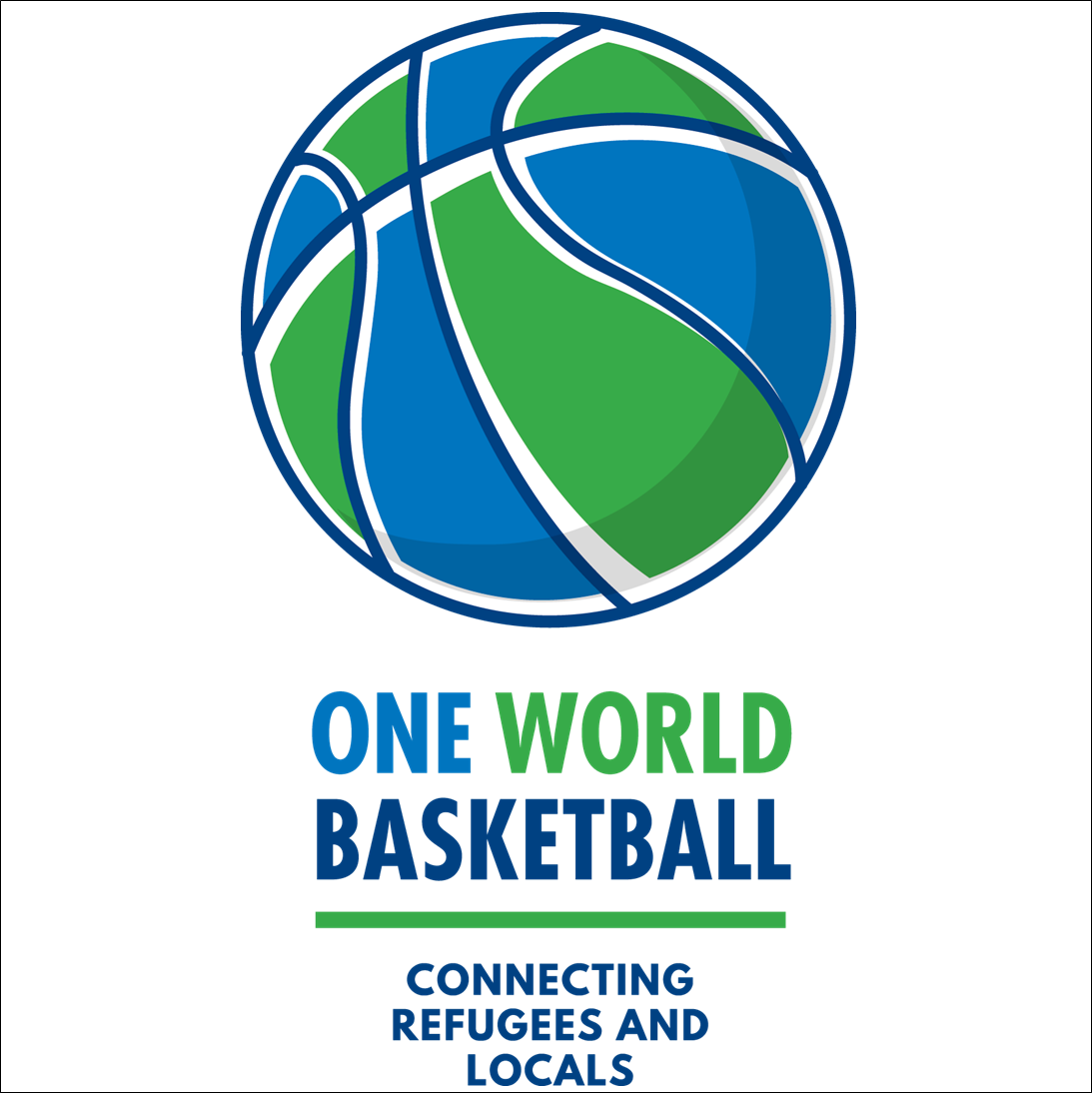 Das Logo von One World Basketball zeigt die Erde in Form eines Basketballs.